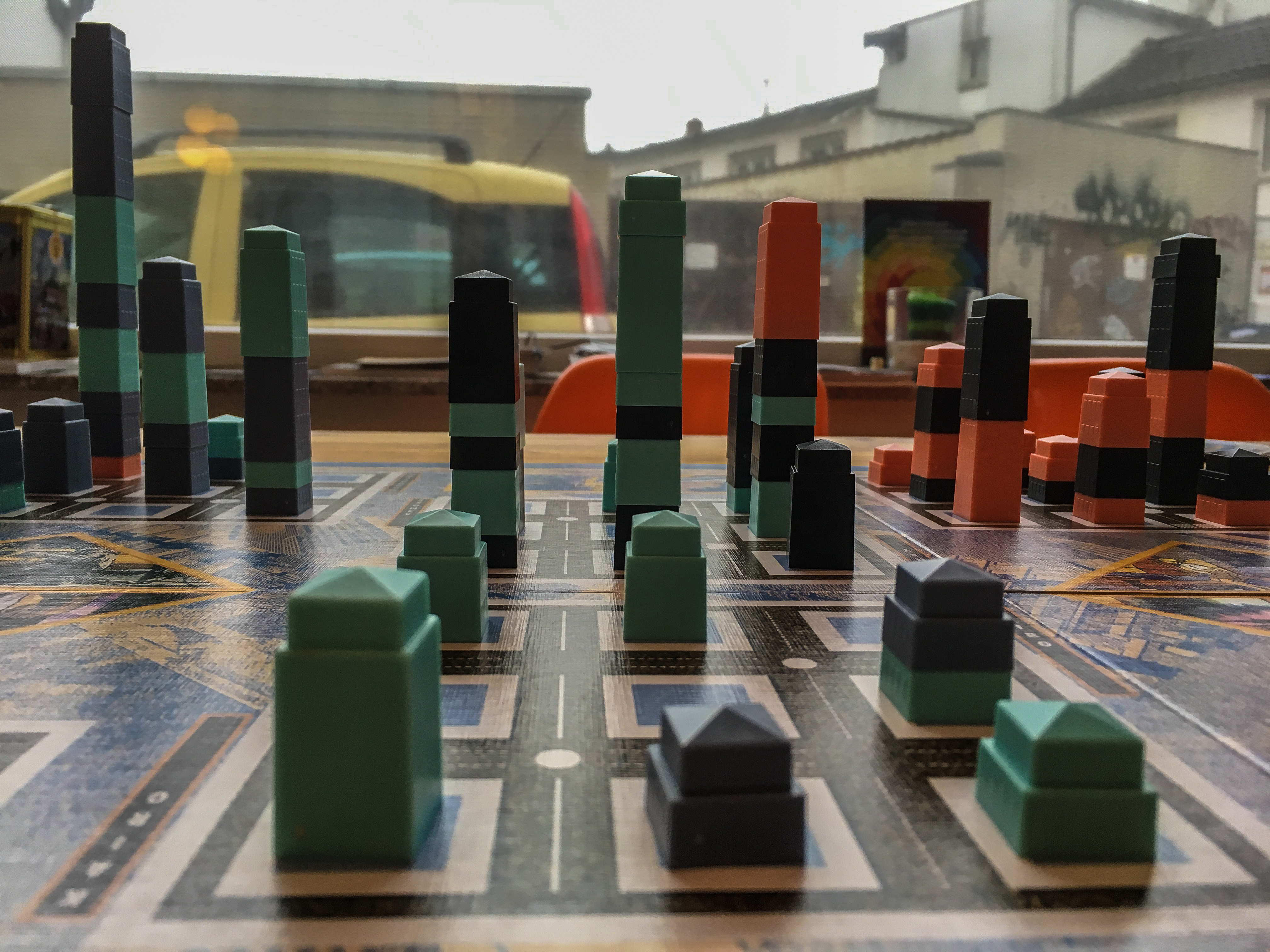 Das Brettspiel Manhattan, Hochhäuser